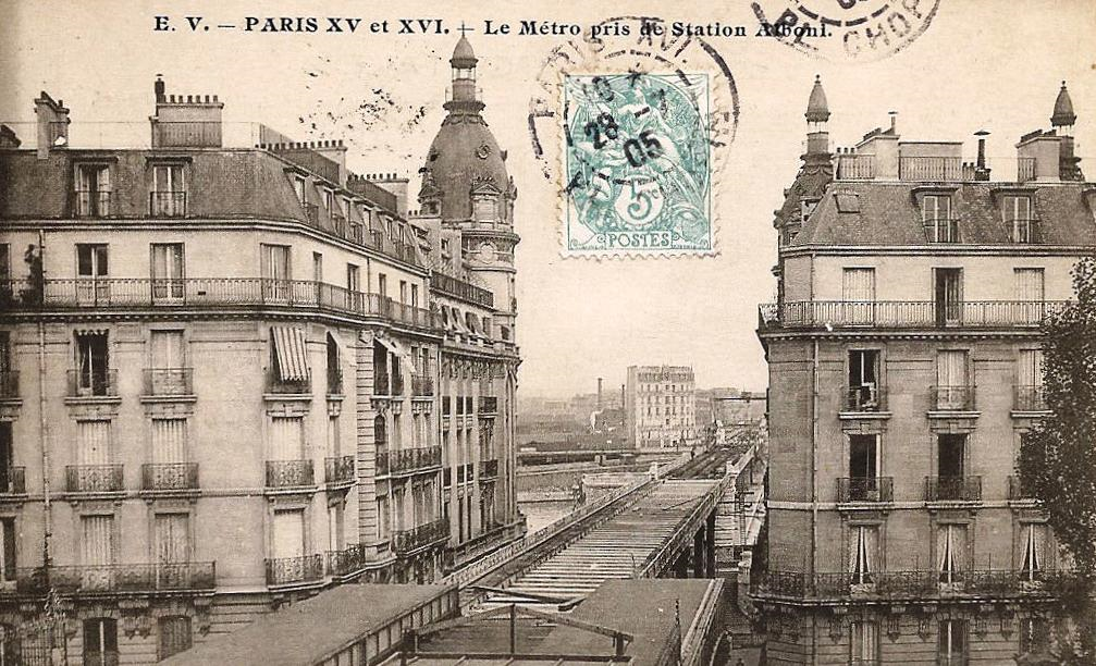 Construction du viaduc de Passy (actuel pont Bir-Hakeim) pour permettre le passage du métro, en 1904. Prise depuis la rive droite. Note : la station n'a en réalité jamais porté le nom fantaisiste, d'Alboni, même provisoirement, probablement donné ici par le photographe.